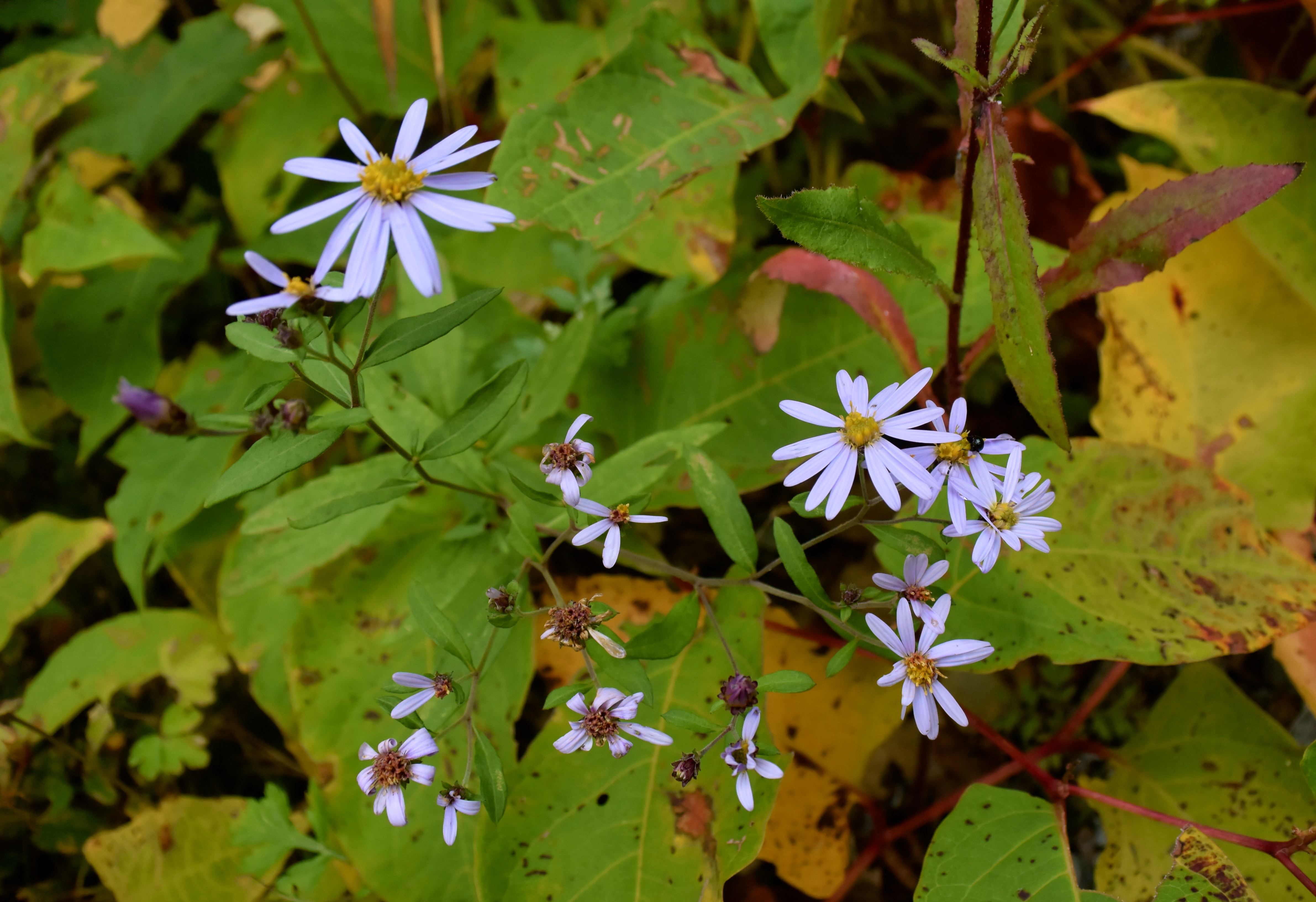 w/ Nikon 1V3 +10-30mm